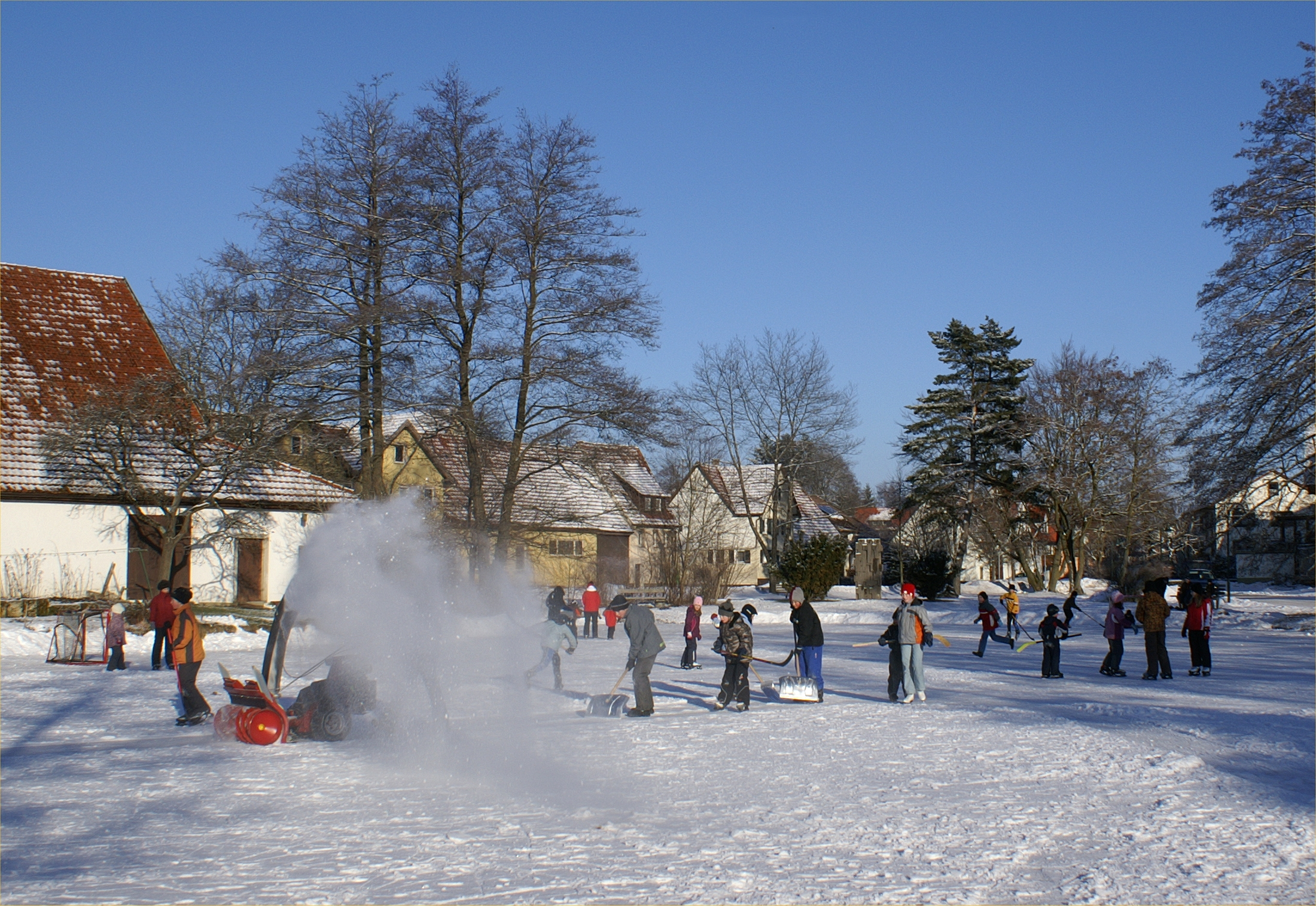 Wenn die Zaininger Hüle tief genug gefroren ist, wird sie gerne zum Schlittschuhlaufen genutzt